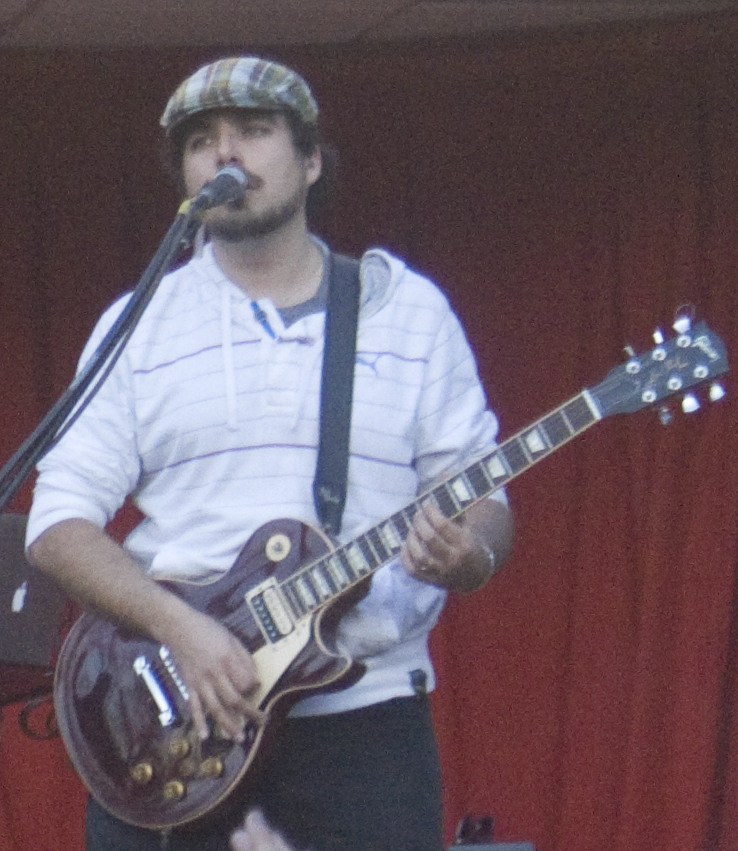 Los Tetas, banda Funk chilena